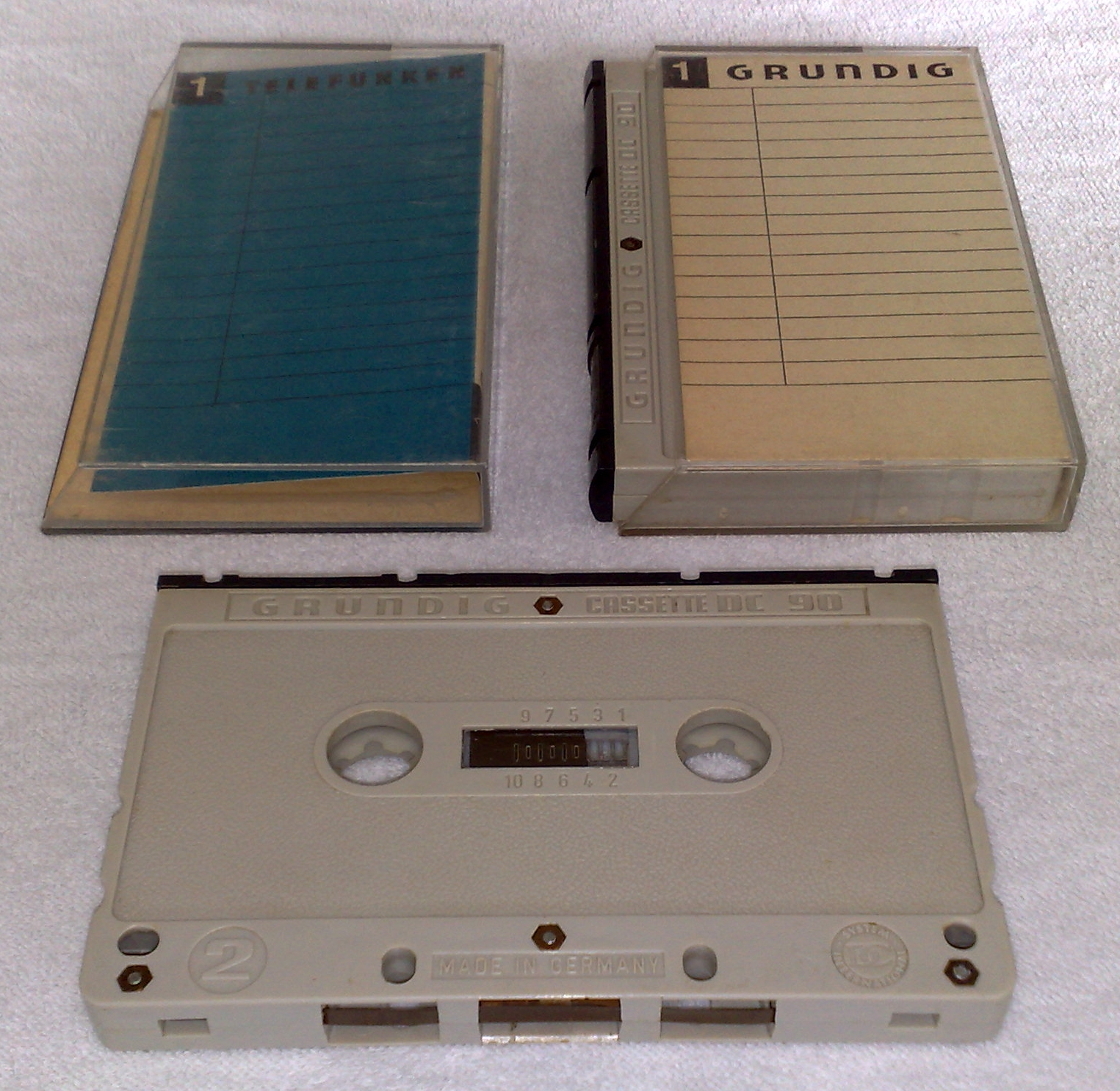 DC-International Kassette, DC-International Kassette in einer Hülle, leere DC-International Kassettenhülle